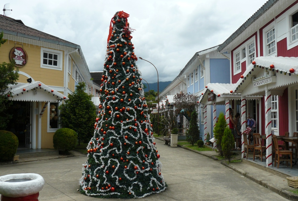 Penedo - RJ